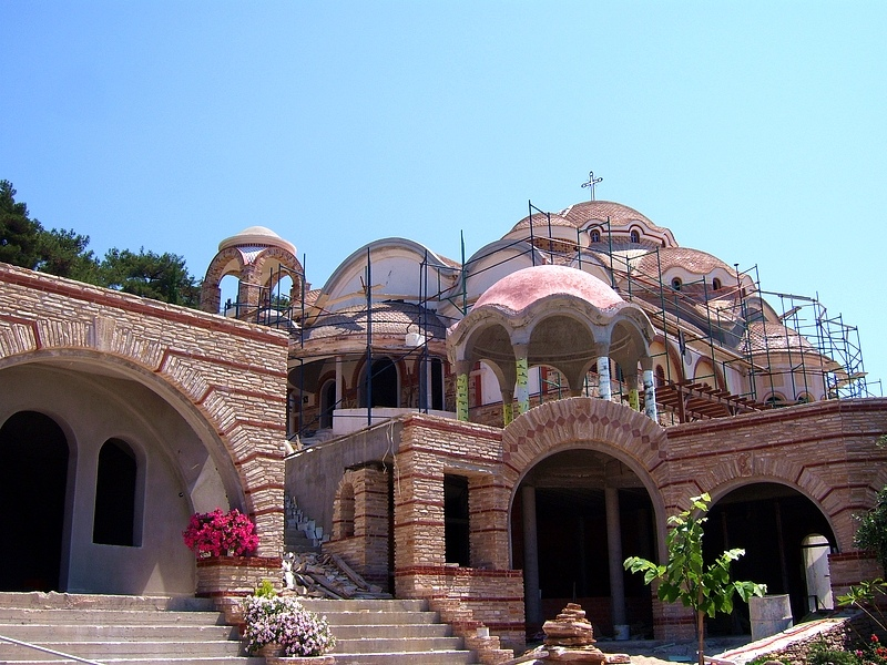 Thassos / Tasos / Θάσος / Тасос